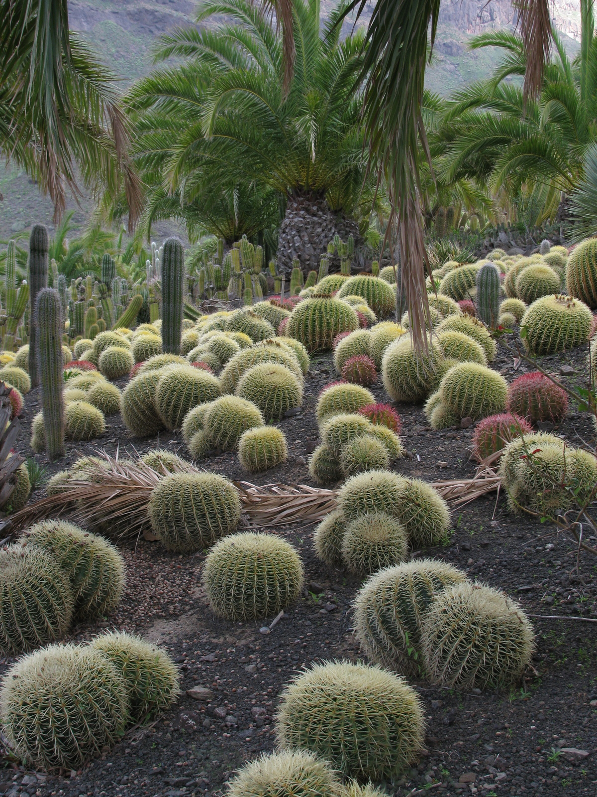 Cactualdea